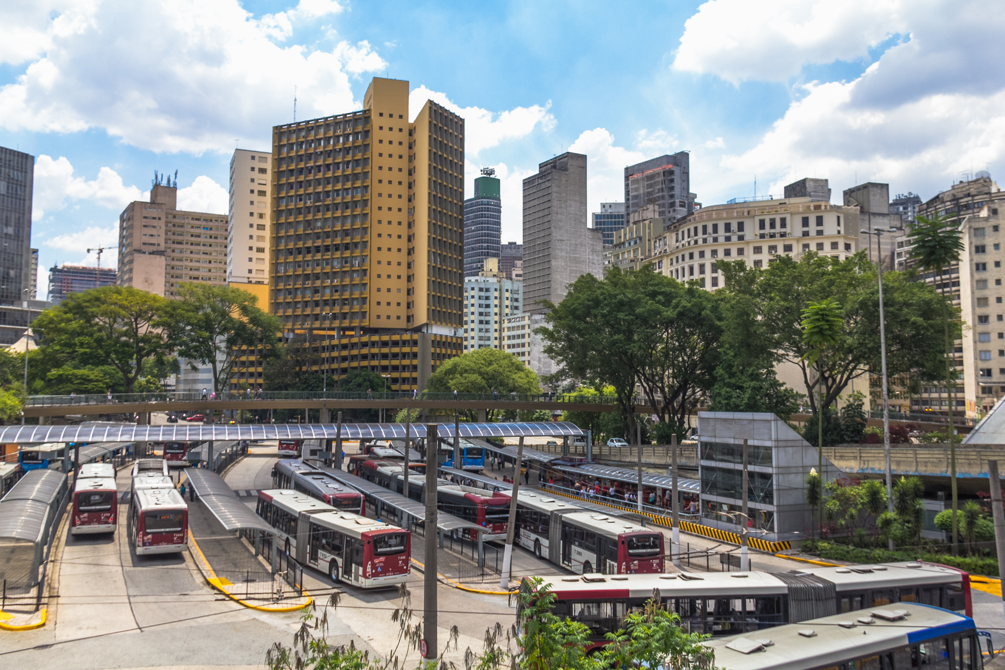 Terninal de onibus,praca da Bandeira,Centro de Sao Paulo.